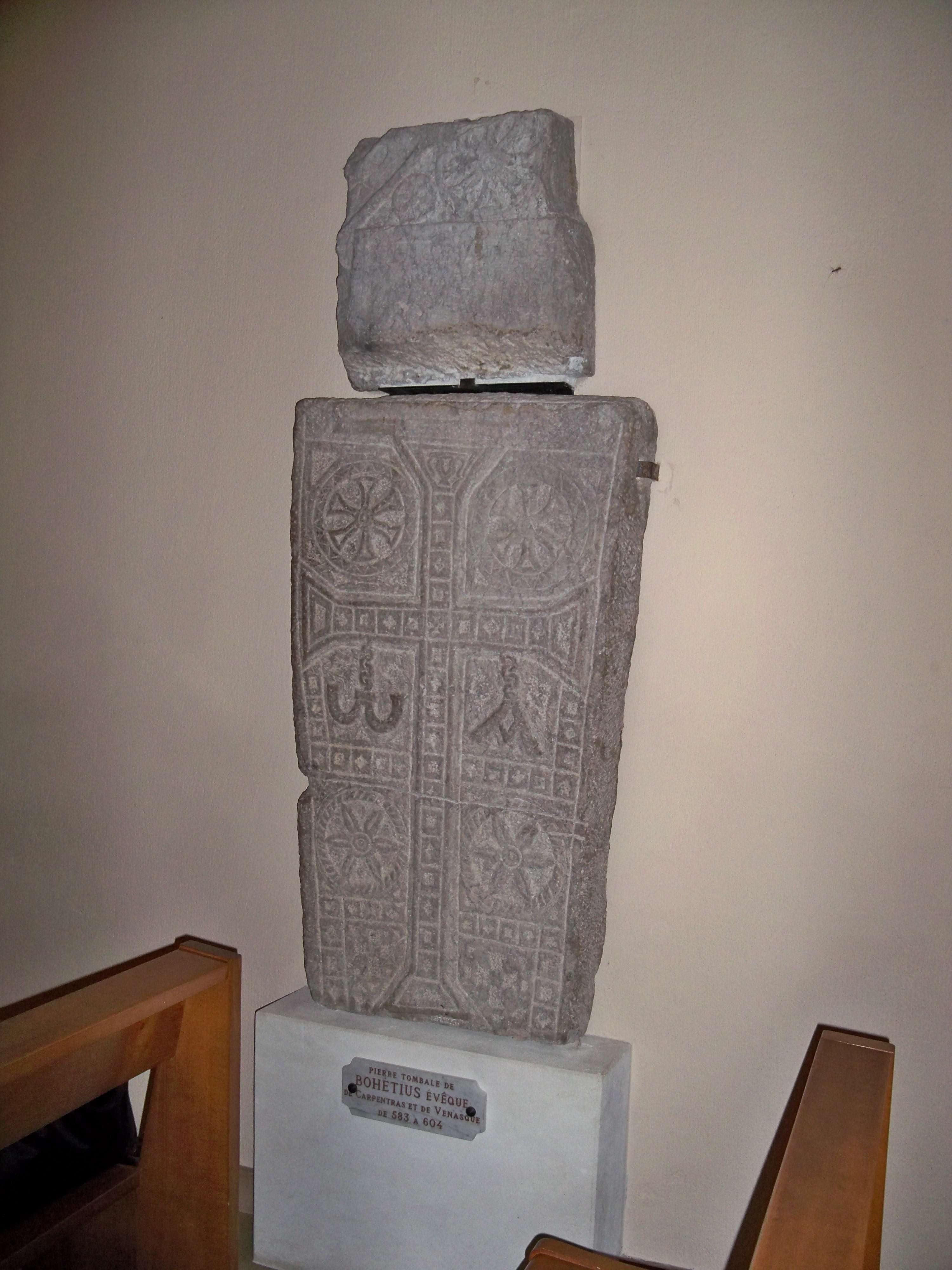 Pierre tombale de Bohétius, évêque de Carpentras et Venasque (Vaucluse, France), de 583 à 604, située dans la chapelle de Notre Dame de Vie, de Venasque.